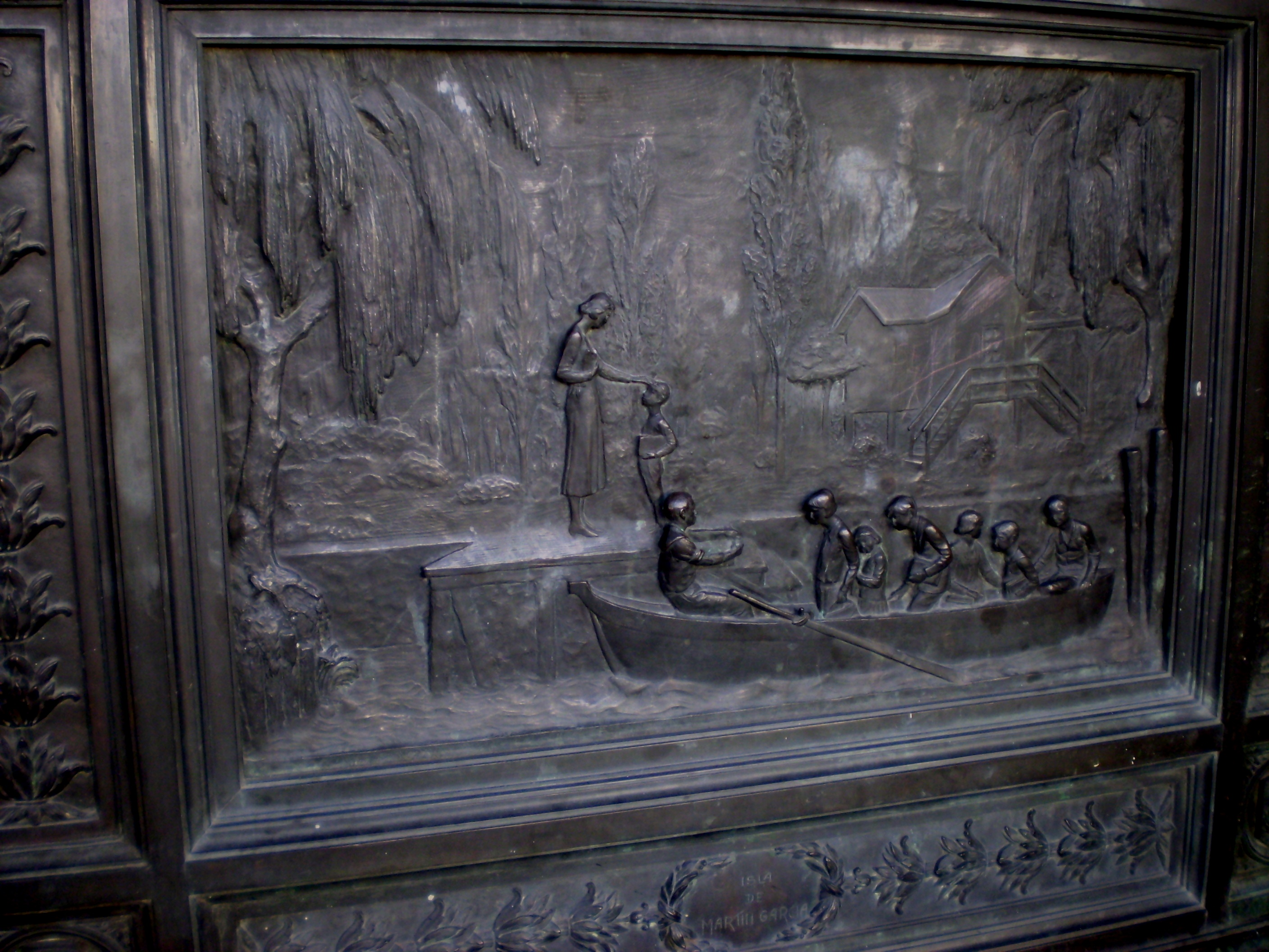 Detalle del portal obra de Arturo Dresco